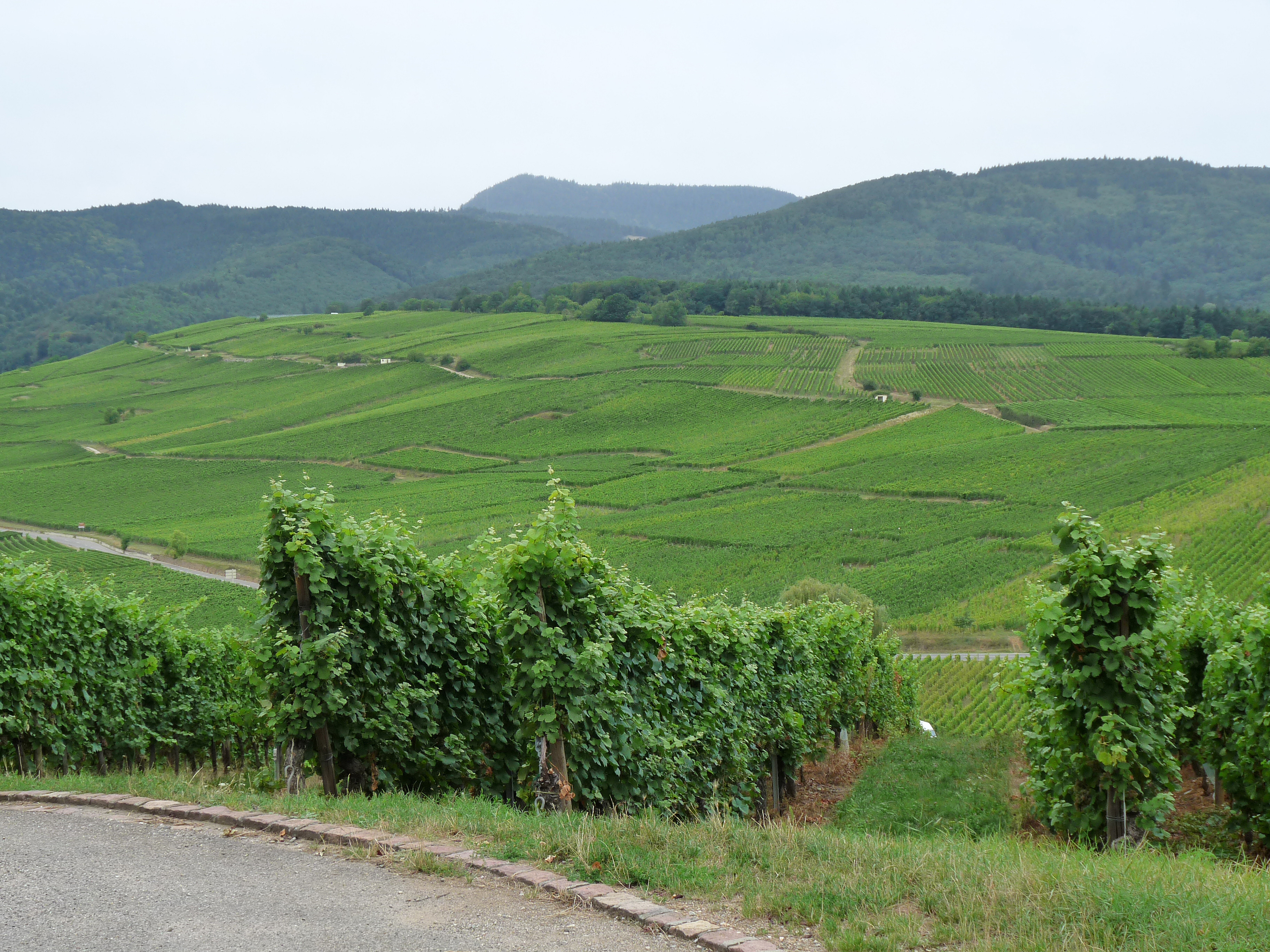 Zellenberg (Haut-Rhin) : vue sur le vignoble